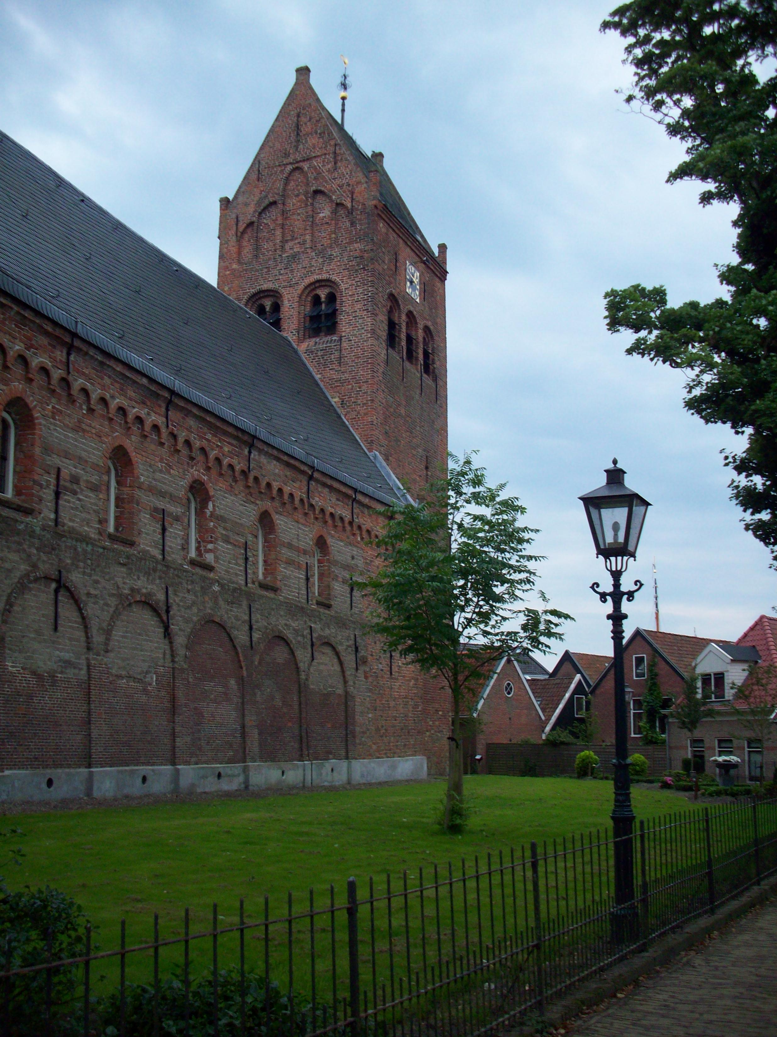 Hervormde Petruskerk in Grouw, toren en schip van noord-oost